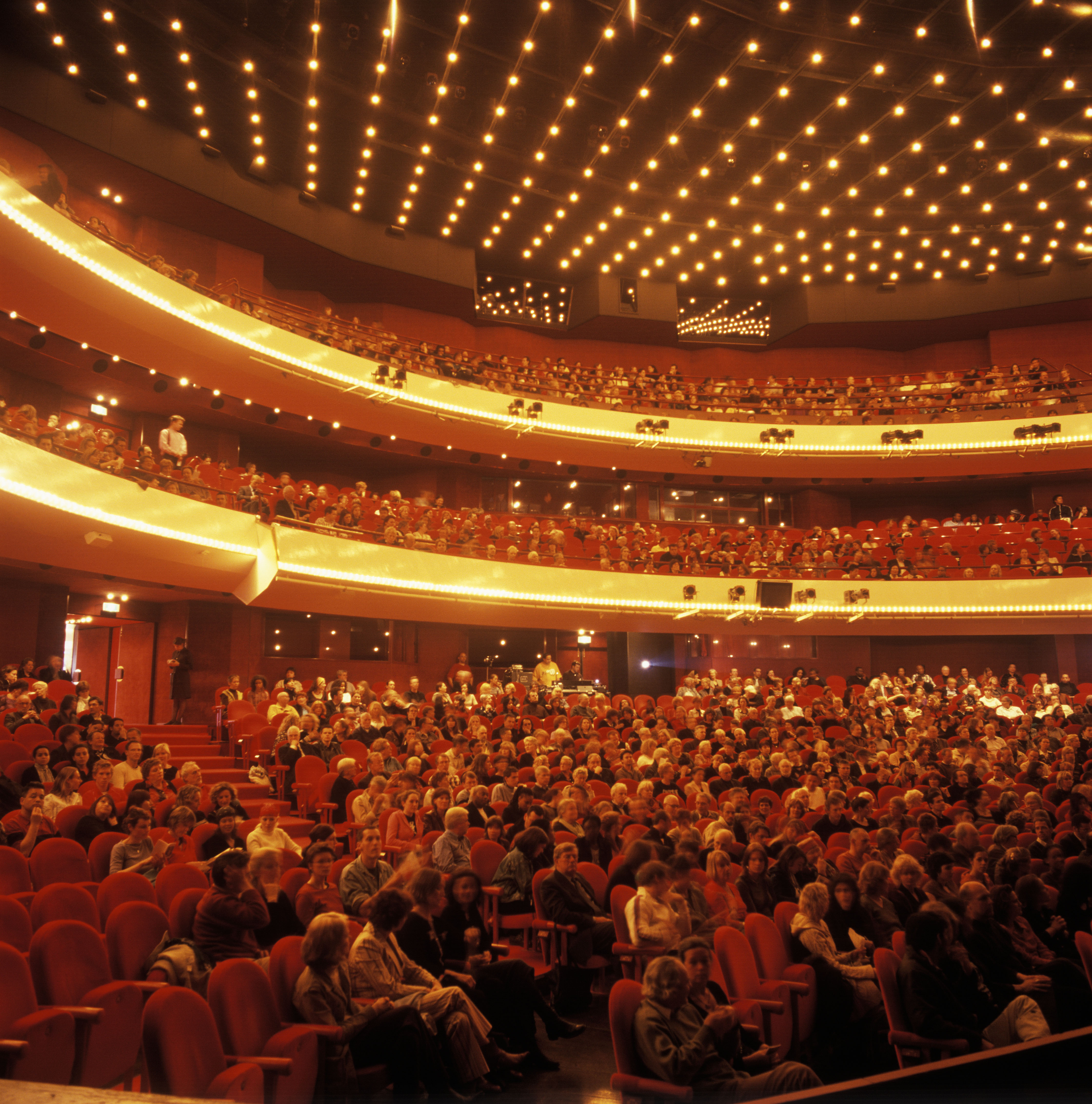 De zaal van Het Muziektheater AmsterdamPeter Struycken designed the light (500 lamps)